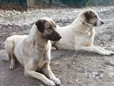 Anatolische Hirtenhunde